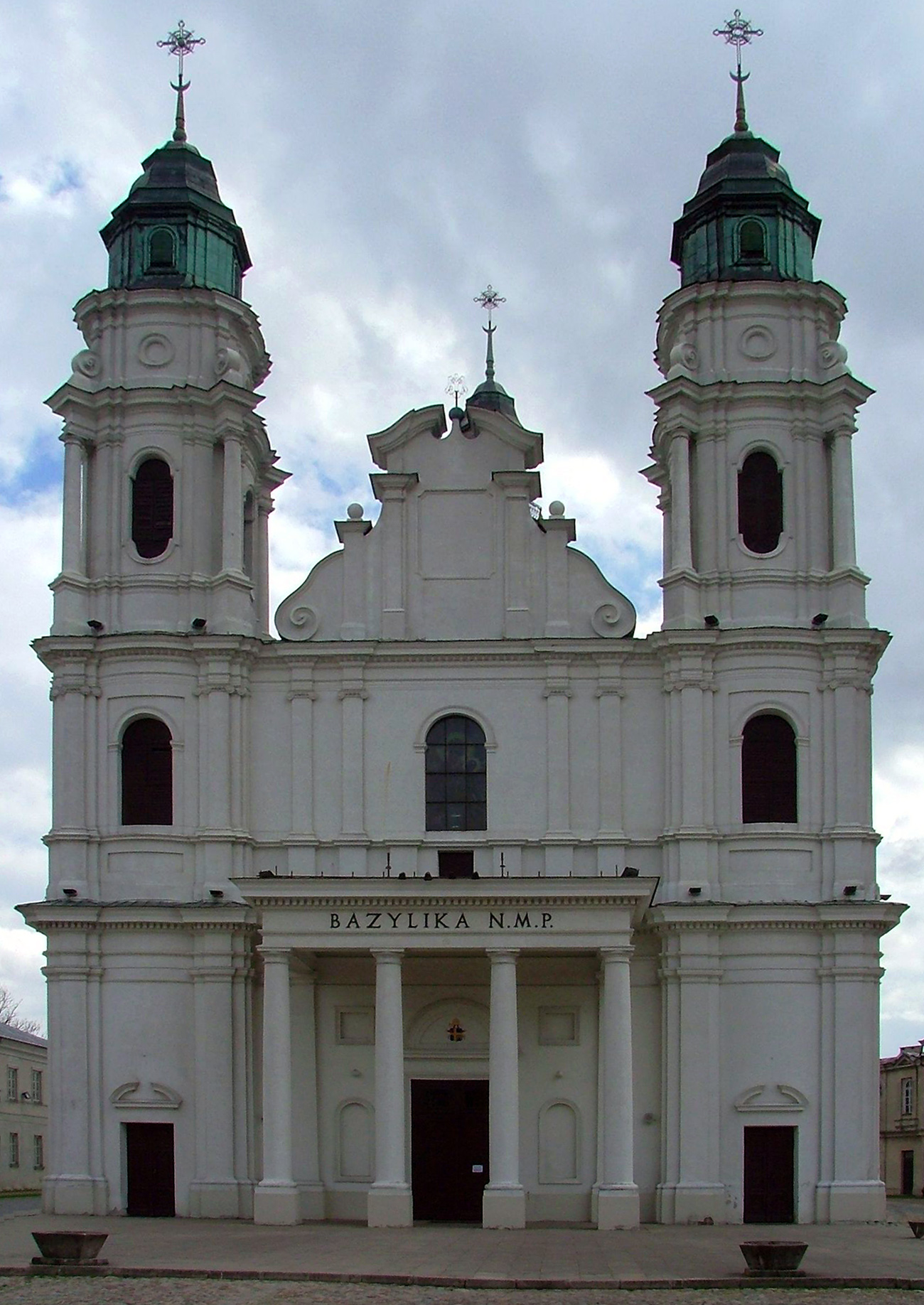 Chełm - Sanktuarium Maryjne na Górze Chełmskiej